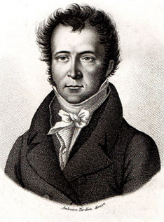 Joseph Mérilhou est un avocat et homme politique français né à Montignac (Dordogne) le 15 octobre 1788 et mort à Neuilly-sur-Seine (Hauts-de-Seine) le 18 octobre 1856. D'opinions libérales, il fut notamment ministre de l'Instruction publique et des Cultes puis ministre de la Justice dans le gouvernement de Jacques Laffitte (1830-1831).